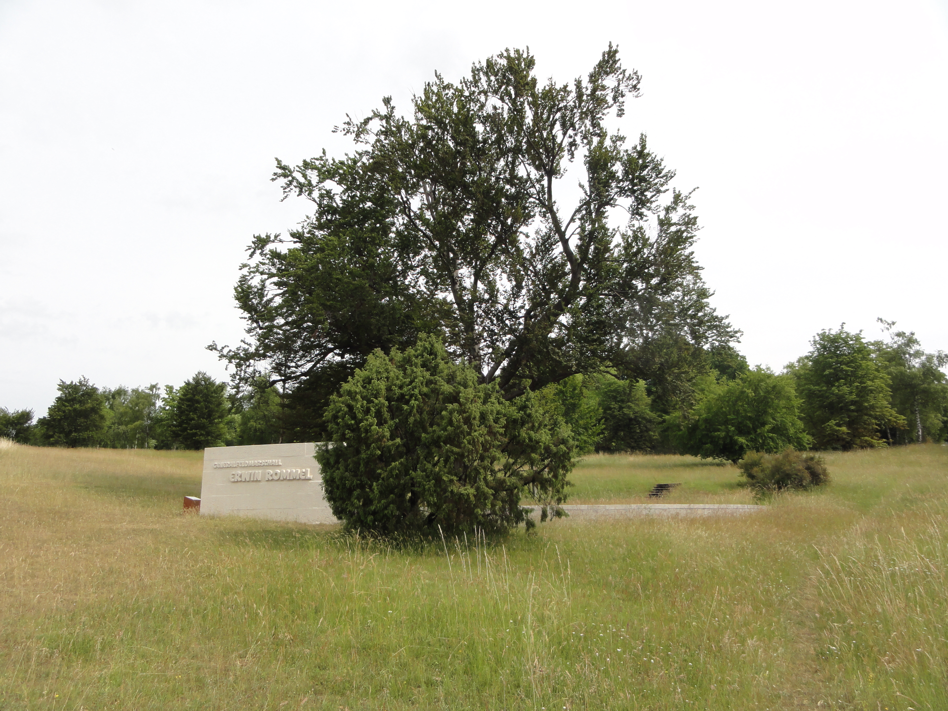 Die Buche am Standort des Rommel-Denkmals